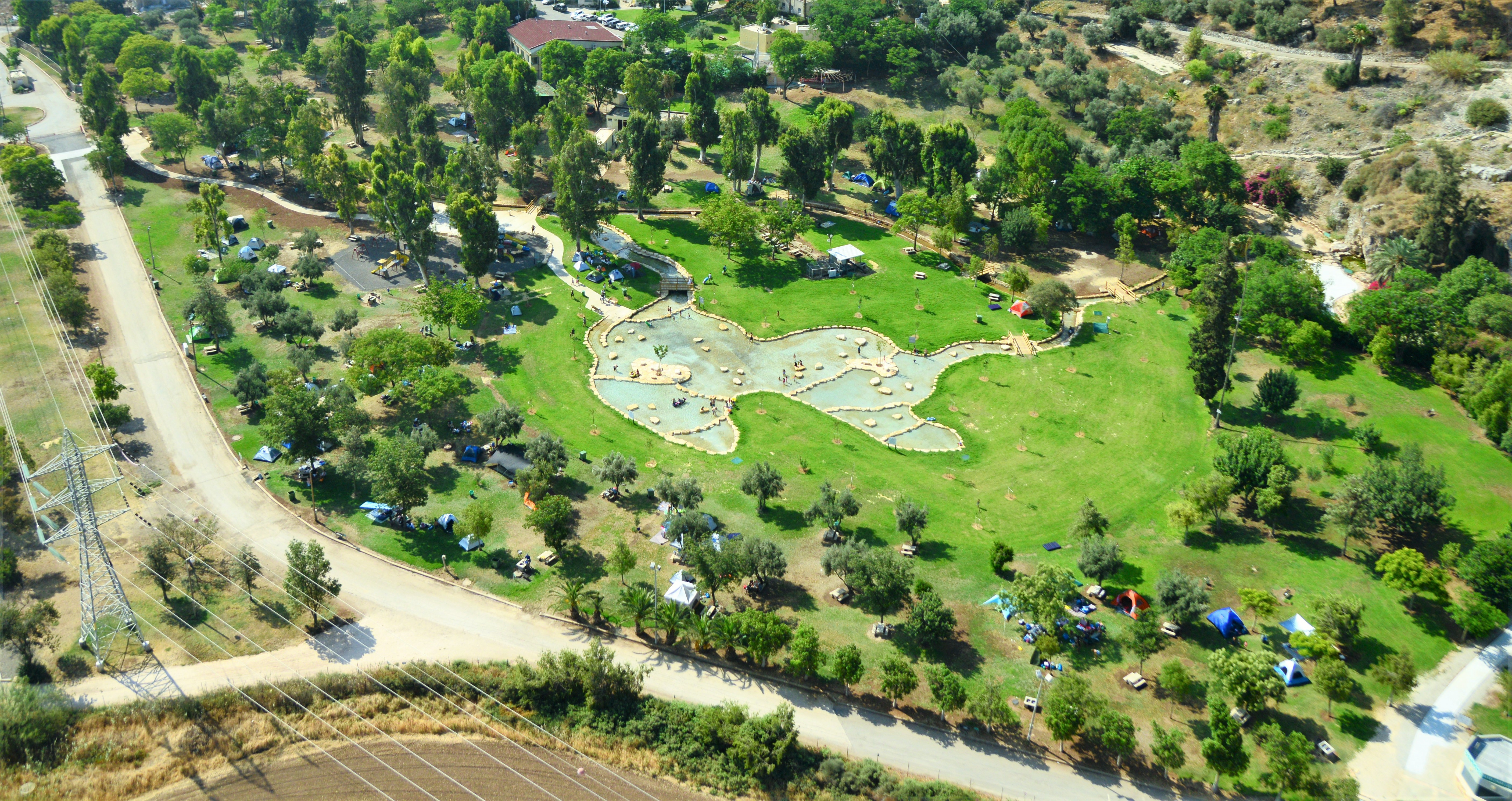 מעיין חרוד (בערבית: عين جالوت, עין ג'אלות. מילולית: "מעיין גוליית") הוא אתר במערב עמק חרוד, למרגלות הר גלבוע, דרומית לכביש 71, ליד המושב גדעונה, בצד כביש 675, בין צומת יזרעאל לצומת נבות. מעין חרוד הוא מעין המים המתוקים היחיד באזור.